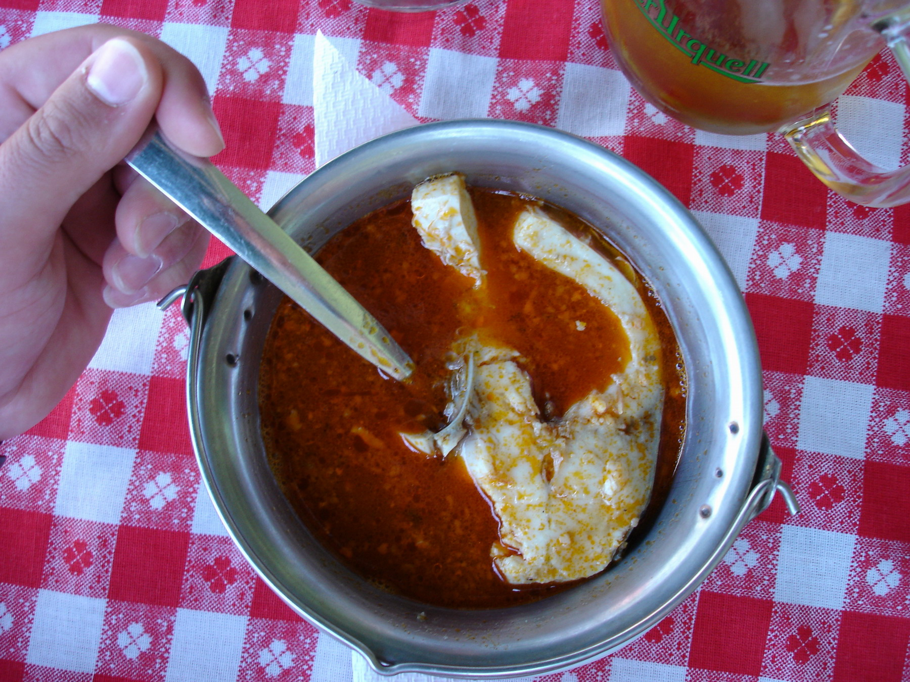 Halászlé-typicka madarska polevka-typical hungarian soup (fish soup)